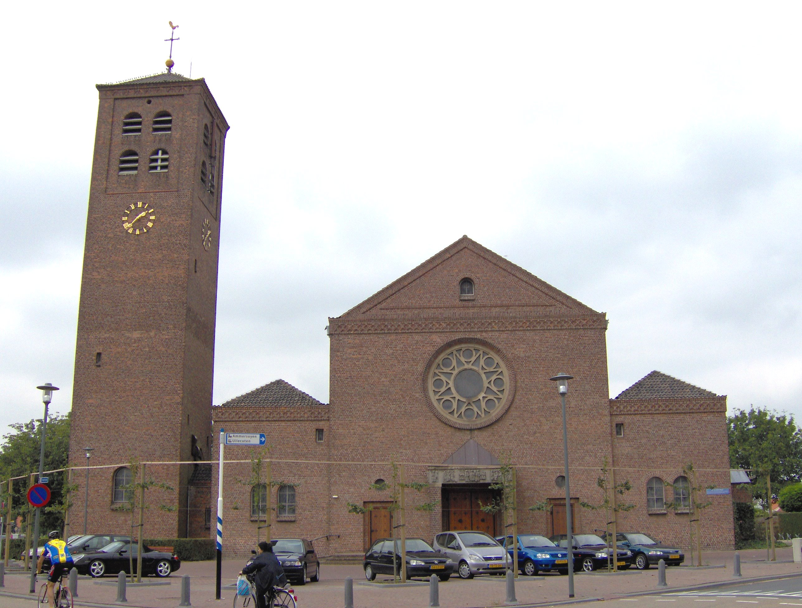 eigen foto